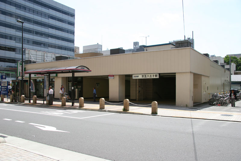 Keio-Hachioji Station West Exit, Hachioji, Tokyo, Japan